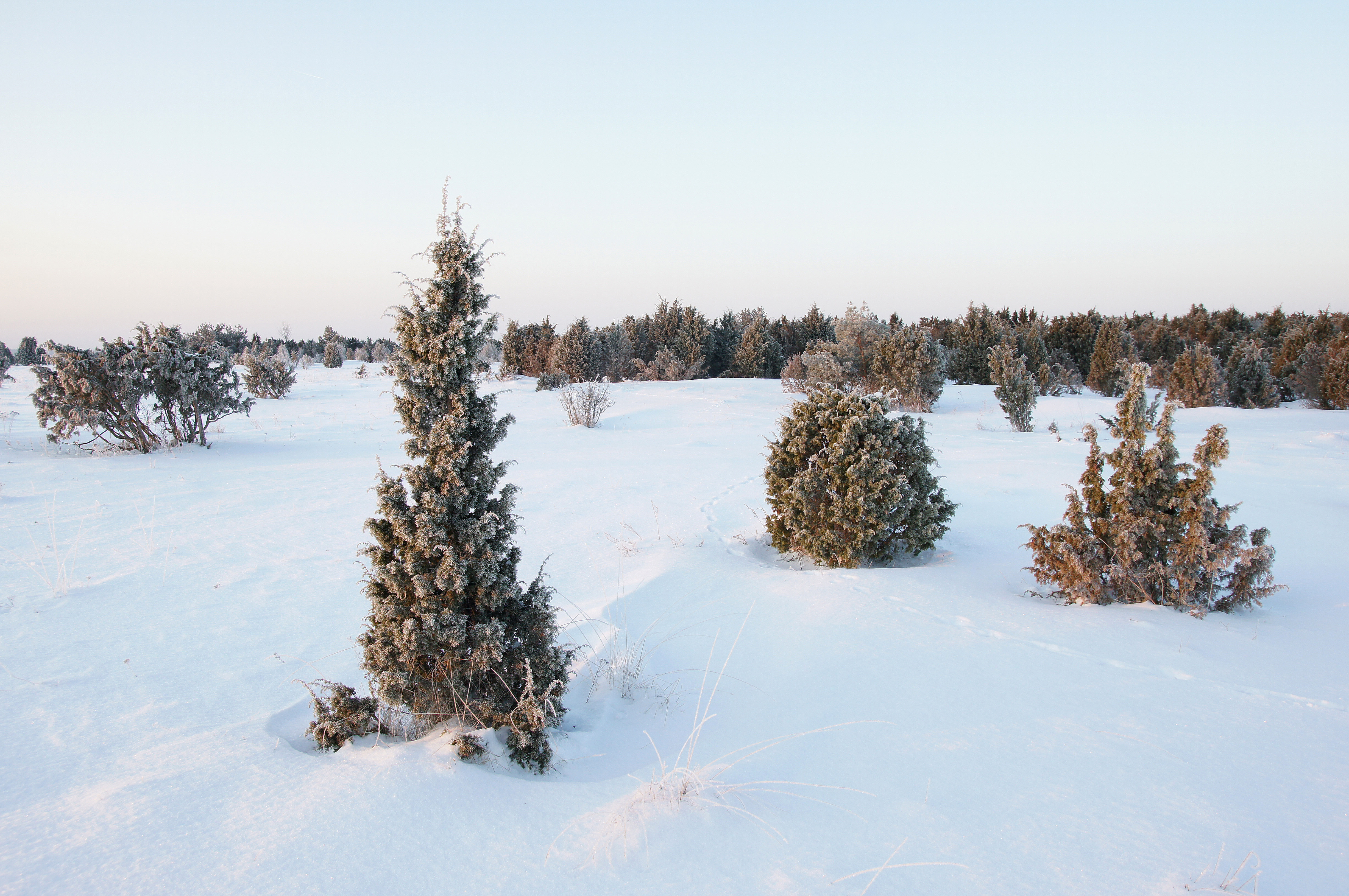 Talvehommik Laidu saarel. Asub Küdema lahes.